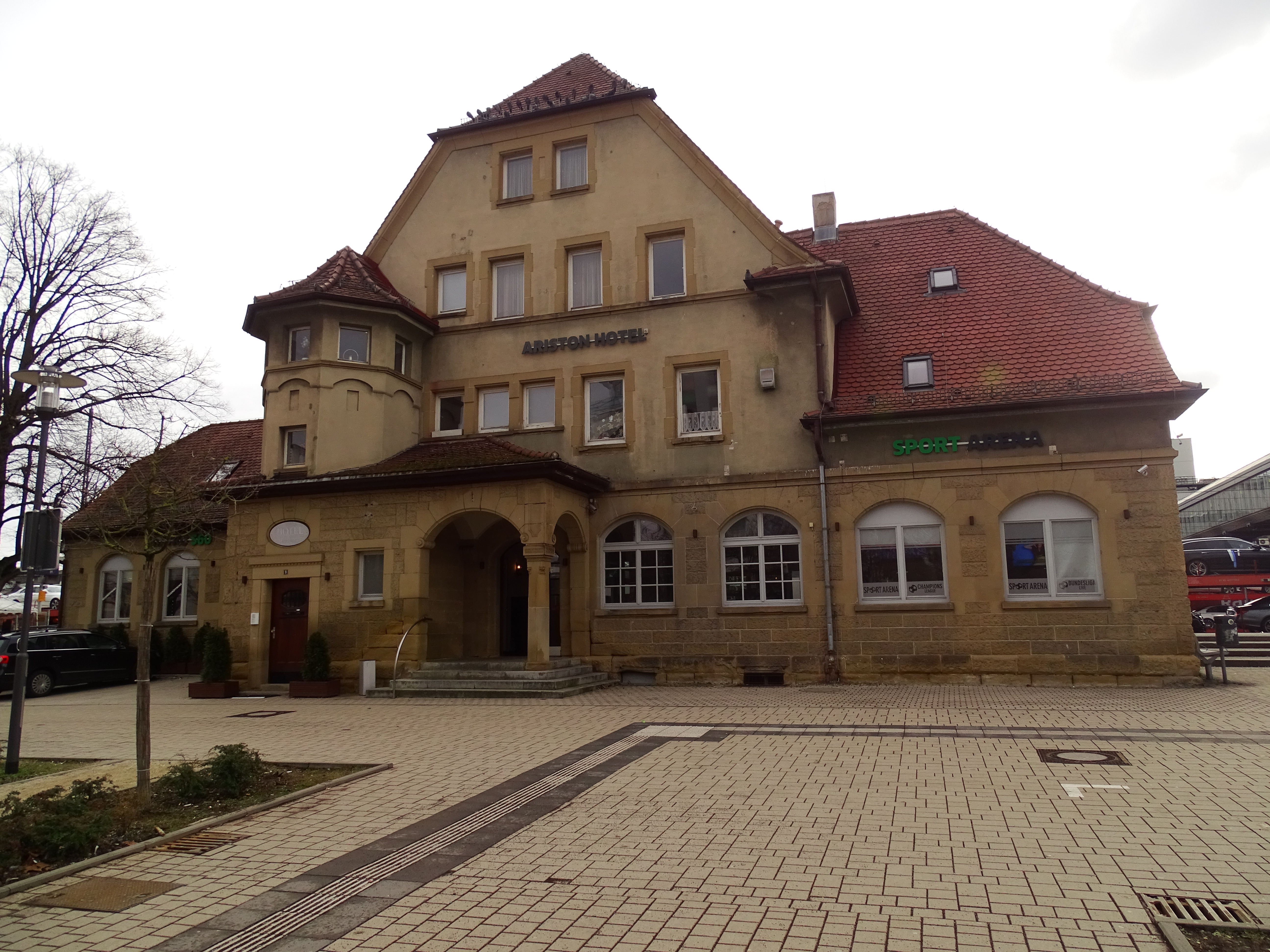 Bahnhof Sindelfingen